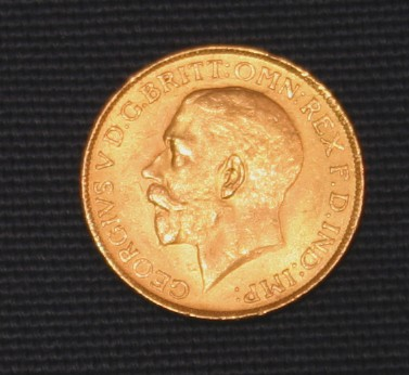 Goldsovereign Georg V